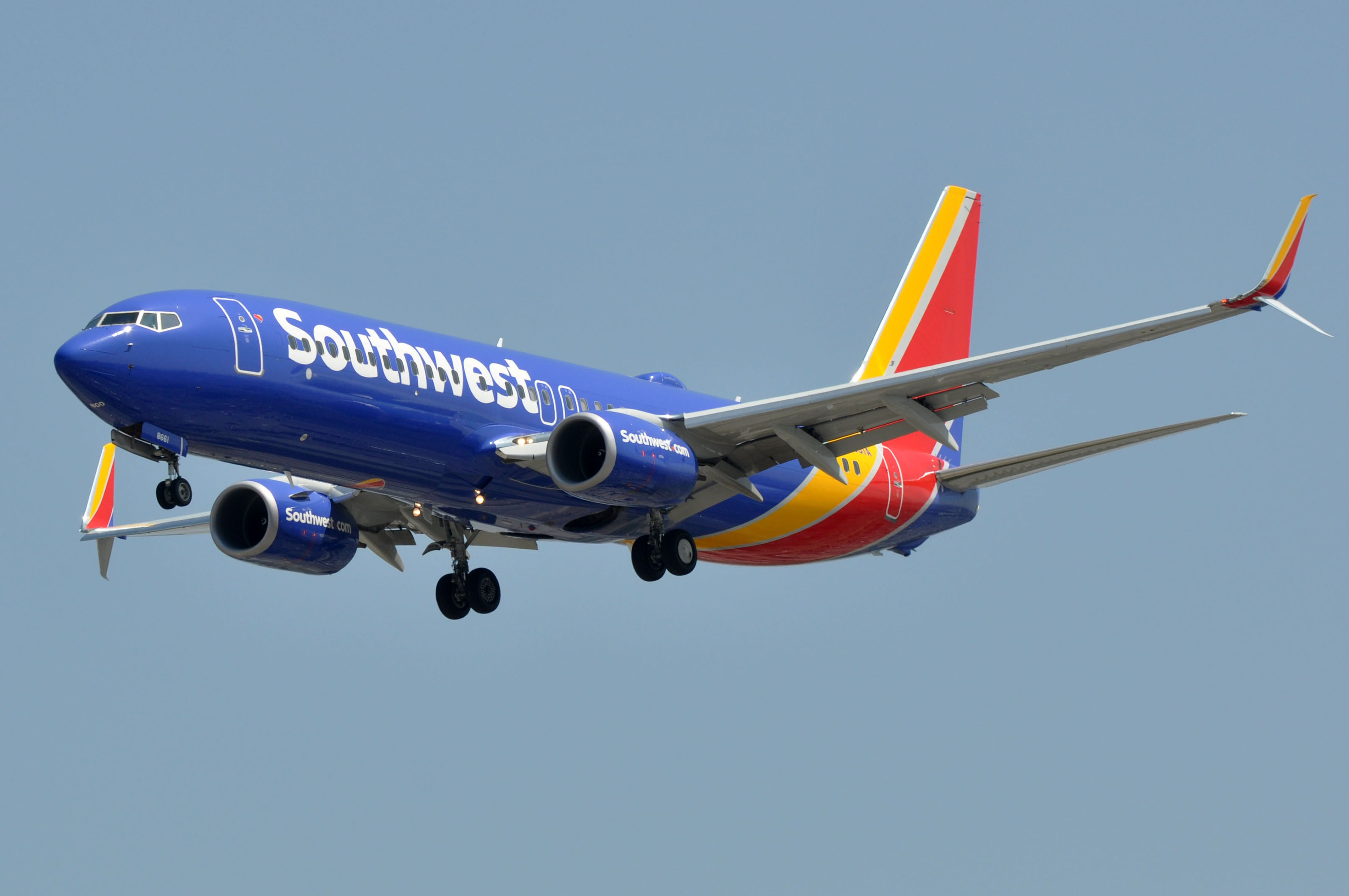 MSN 36906 LN 5283 B737-8H4 / 737 / 737-800 SOUTHWEST AIRLINES LAX AIRPORT